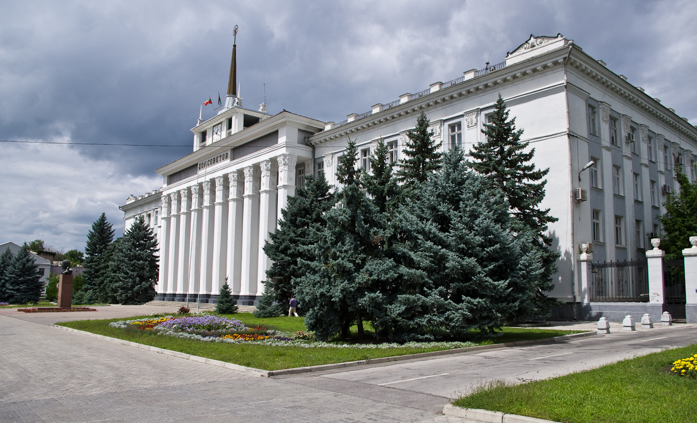 Дом Советов на улице 25 Октября